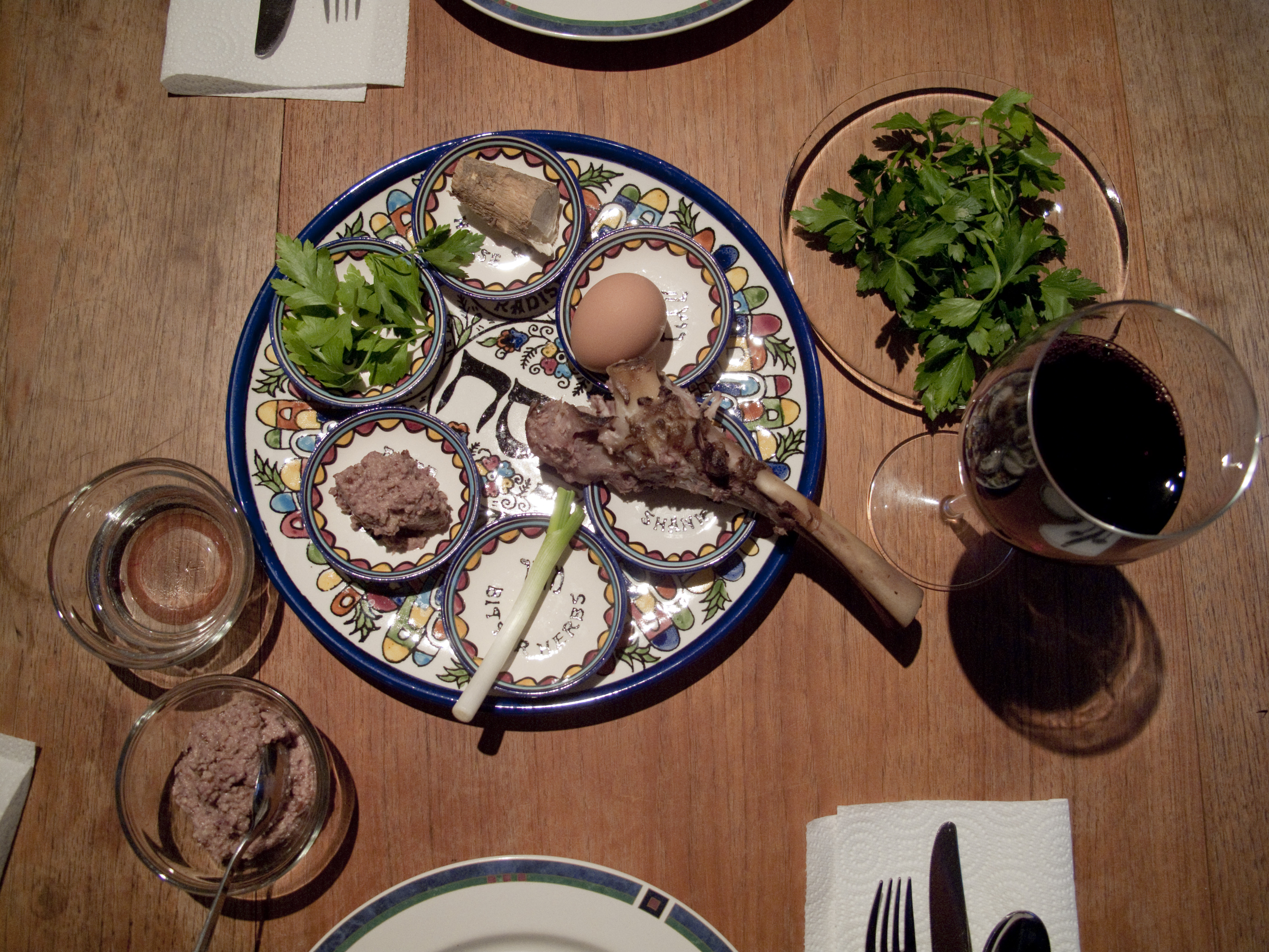 Gastronomie juive de Pessah en Égypte (et ailleurs). Il s'agit des mets symboliques préparés sur le plat de présentation du seder pendant les prières et la lecture de la Haggadah de Pessah, la Pâque juive